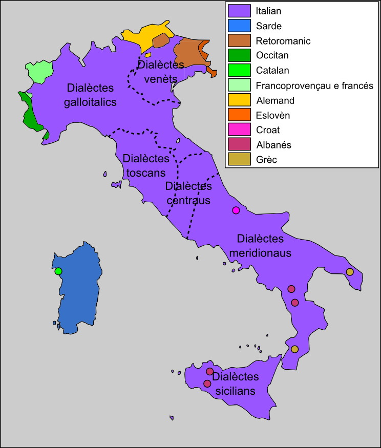 Lengas principalas d'Itàlia.